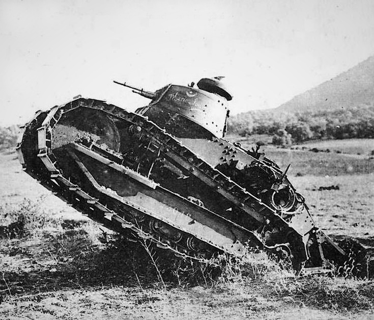 Tanque Renault F-17 de fabricación francesa. Perteneciente al Ejército Español durante la Guerra del Rif.